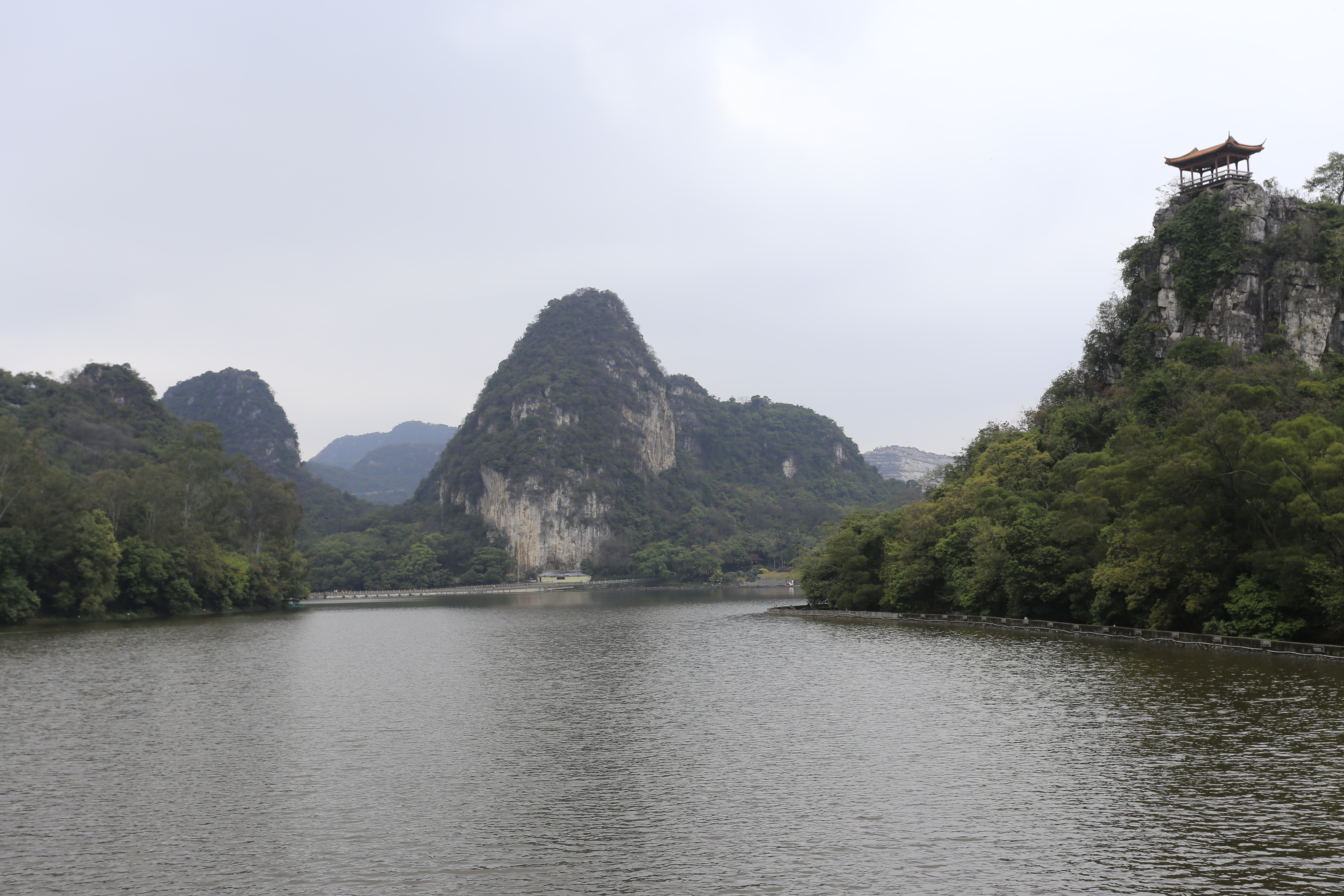 柳州鲤鱼嘴遗址